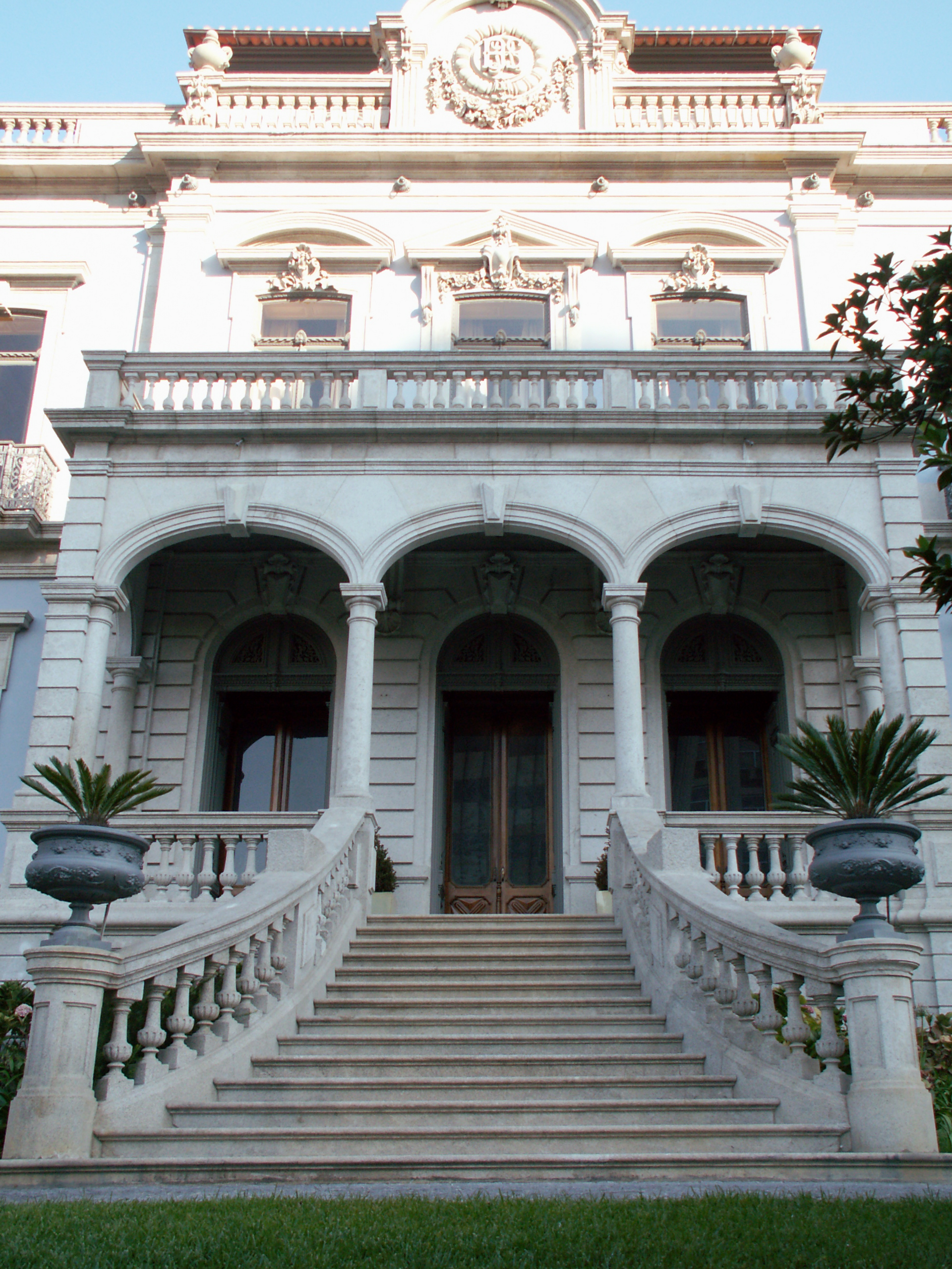 Boavista Dom